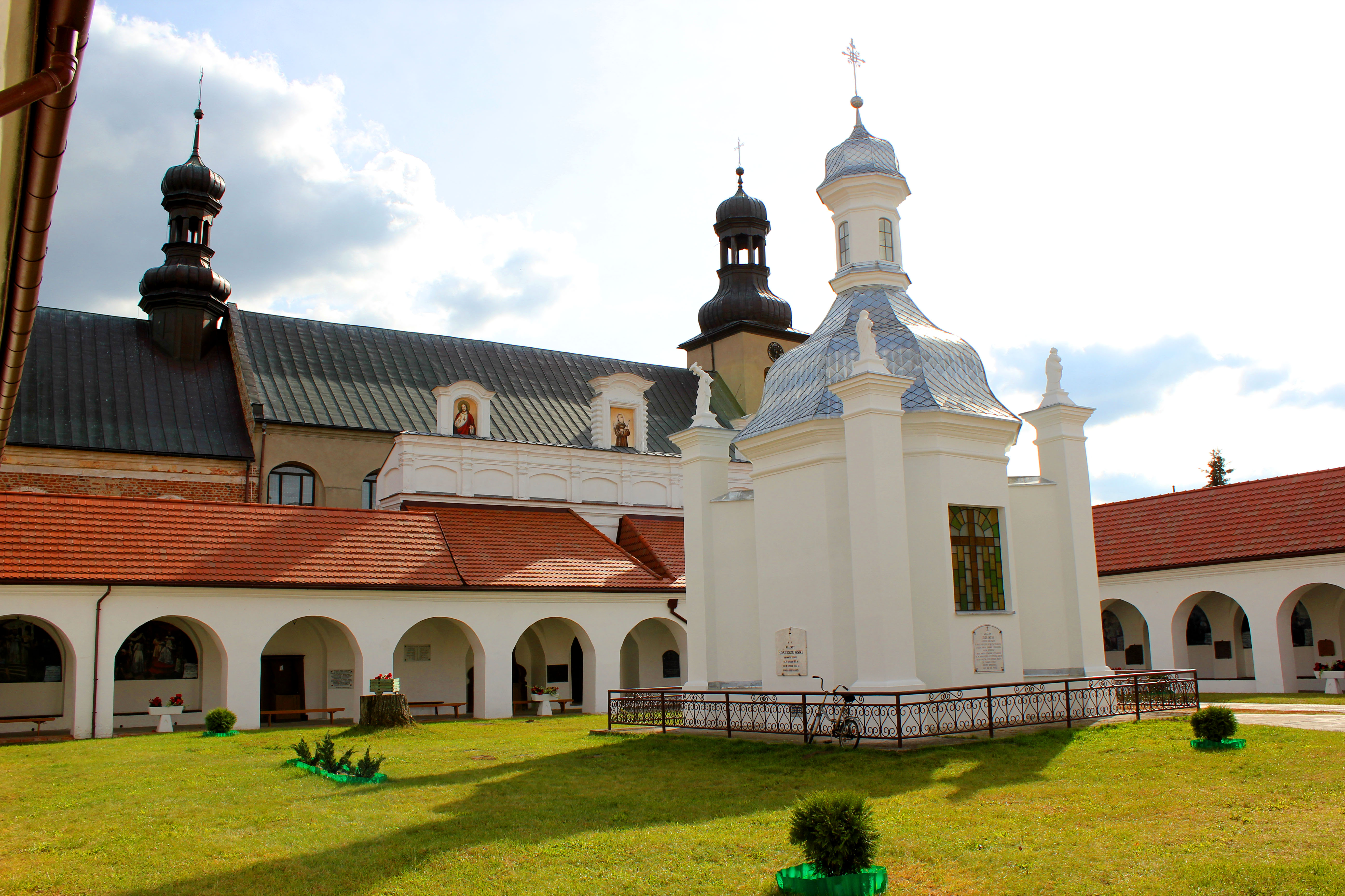 Skępe Wymyślin - zespół klasztorny bernardynów, 1498, XVIII: kościół p.w. Zwiastowania NMP; klasztor; otoczenie (zabytek nr 303)